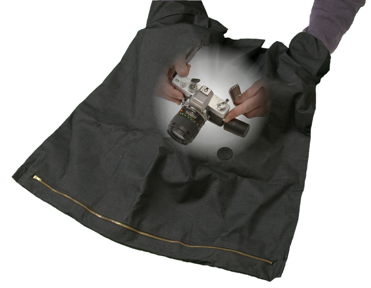 Wechselsack, zweilagiges, lichtdichtes Gewebe, unten Reißverschluß zum Beschicken, oben zwei mit Gummizug abgedichtete Eingriffsöffnungen. Montage aus zwei Aufnahmen, um das Innenleben darzustellen.